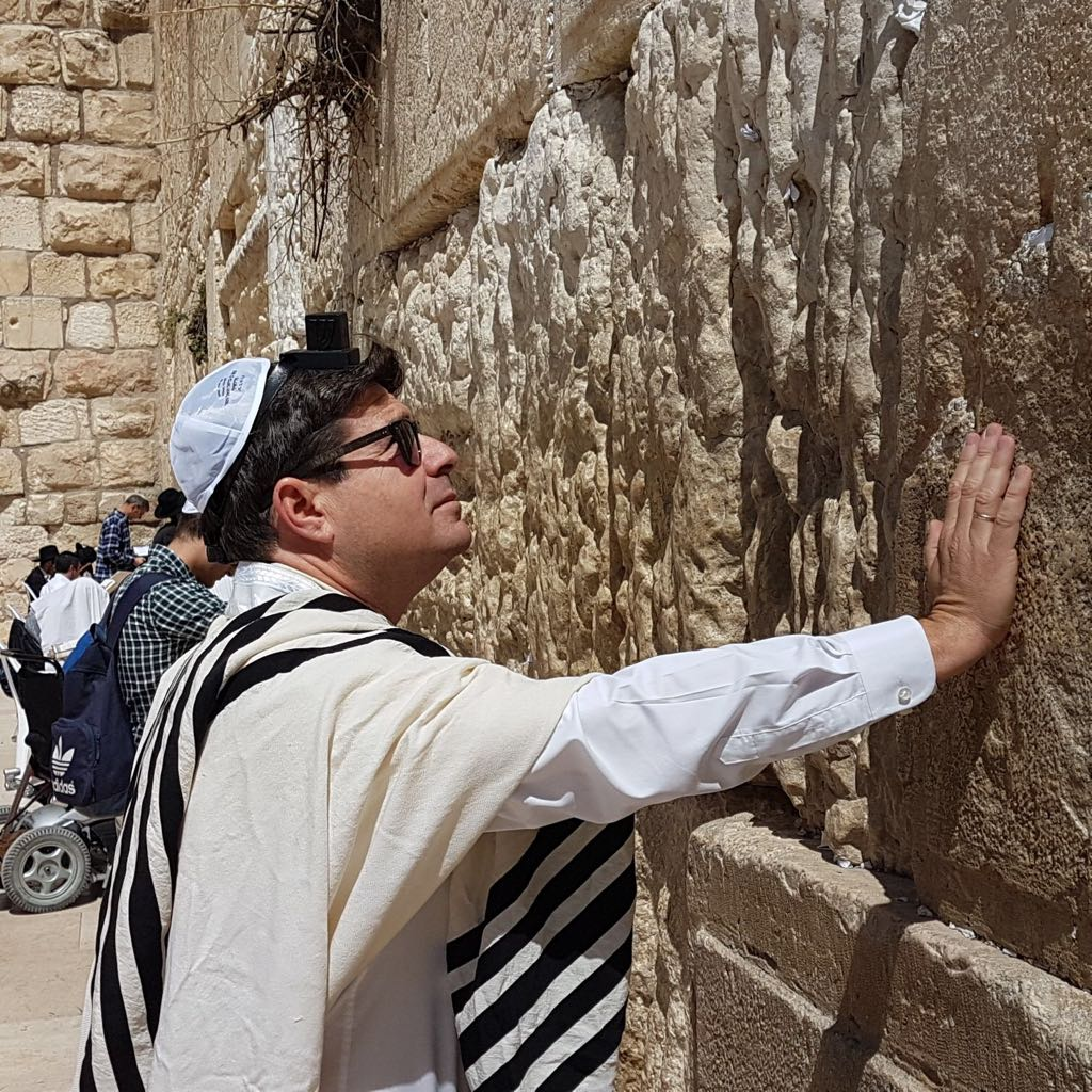 אופיר אקוניס בכותל המערבי